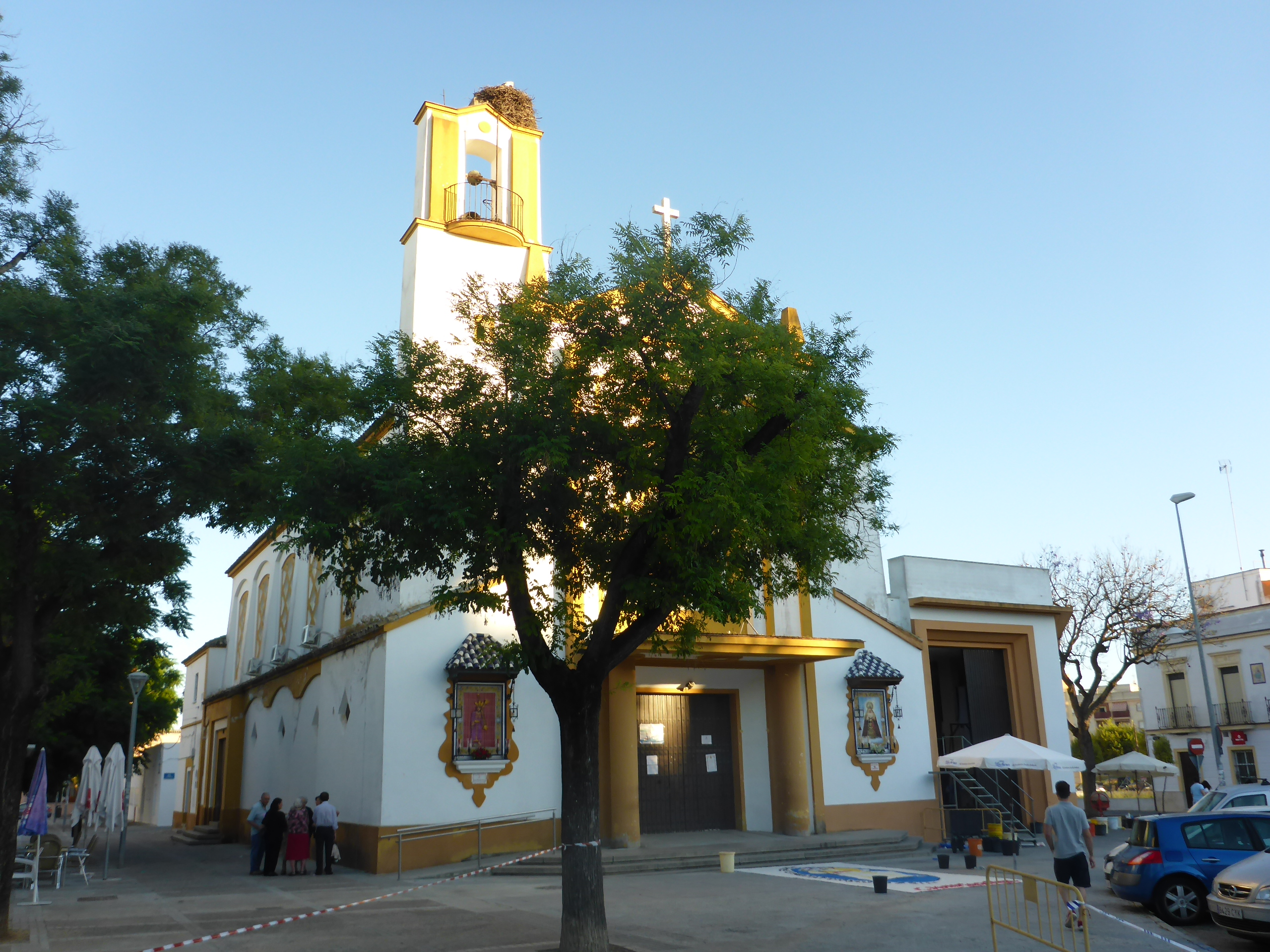 Víspera del Corpus de la Hermandad de La Candelaria en Jerez de la Frontera (Andalucía, España)